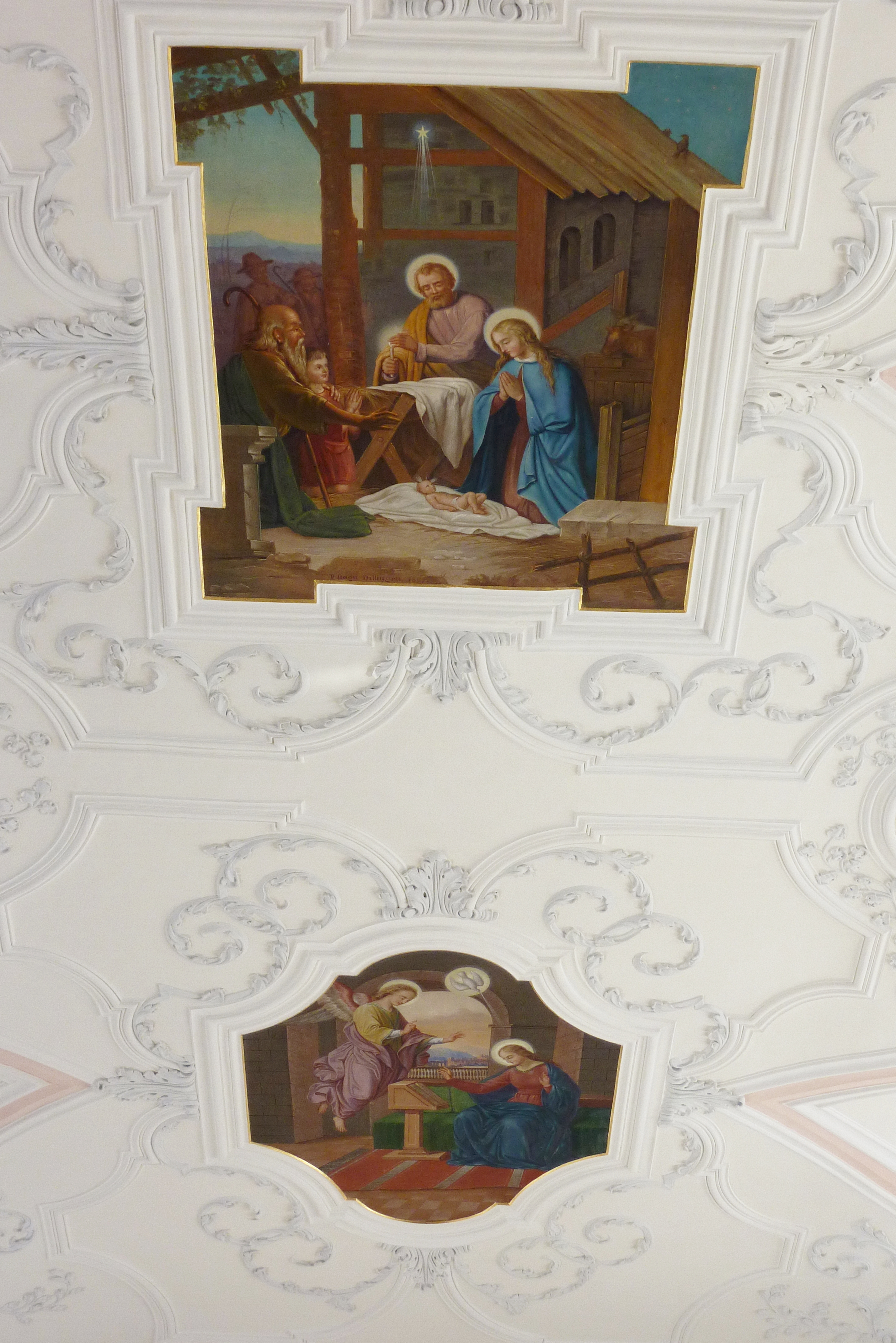 Katholische Pfarrkirche St. Peter in Burghagel, einem Ortsteil der Gemeinde Bachhagel im Landkreis Dillingen an der Donau (Bayern), Stuck und Deckenmalerei im Langhaus, Darstellung: Mariä Verkündigung und Geburt Christi